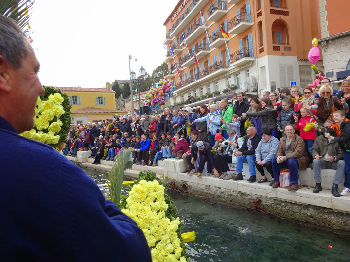 Durant le Combat naval fleuri 2015, Villefranche-sur-Mer, Alpes-Maritimes, France